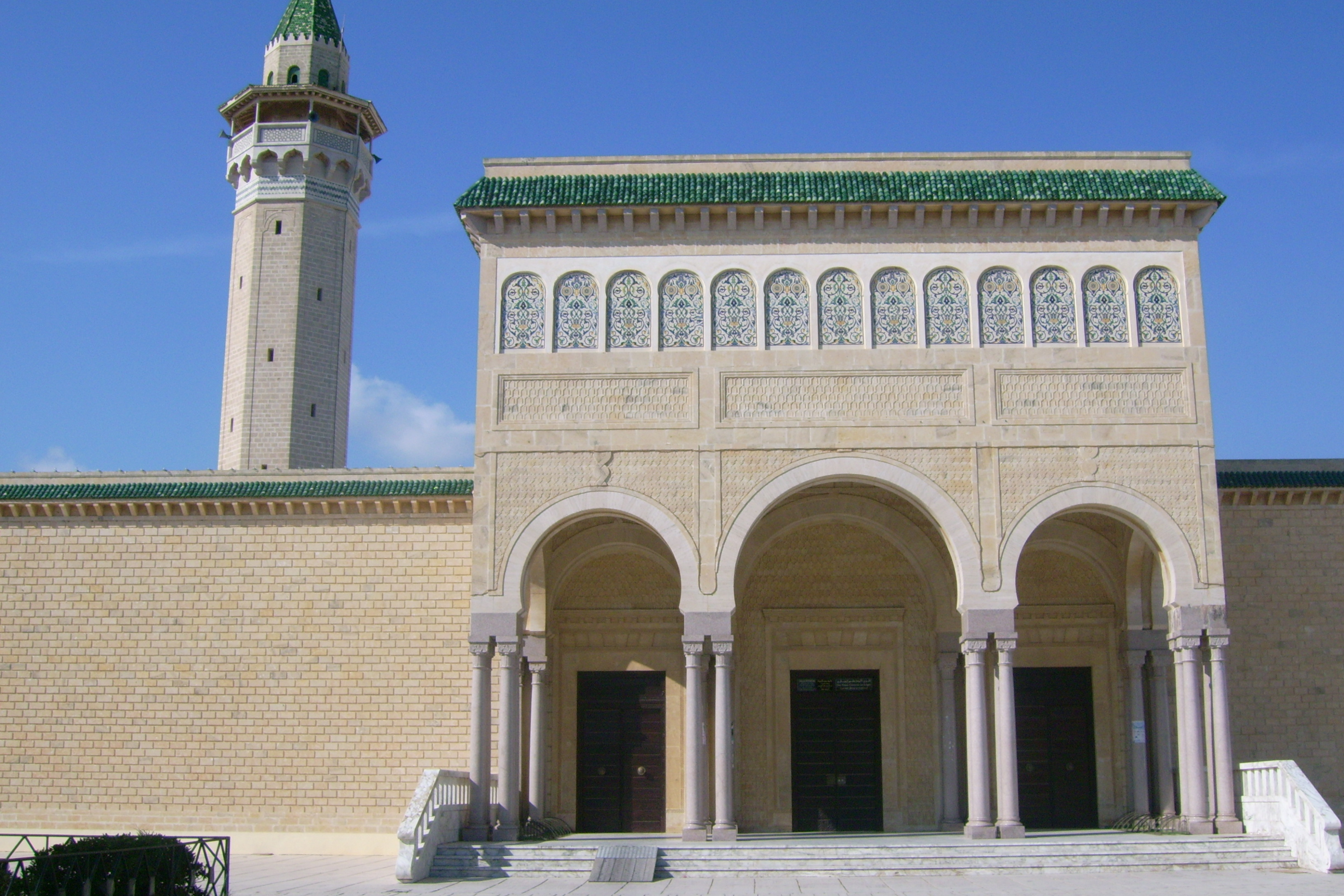 Meczet Bourgiby w Monastirze, Tunezja/Bourguiba Mosque, Monastir (Tunisia)